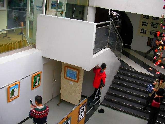 暁秀初等学校本館の通称「展示廊下」をＡセンターより俯瞰したもの。写っている人物は全て外来者である（在籍の児童や教職員ではない）。平成19年2月18日撮影。